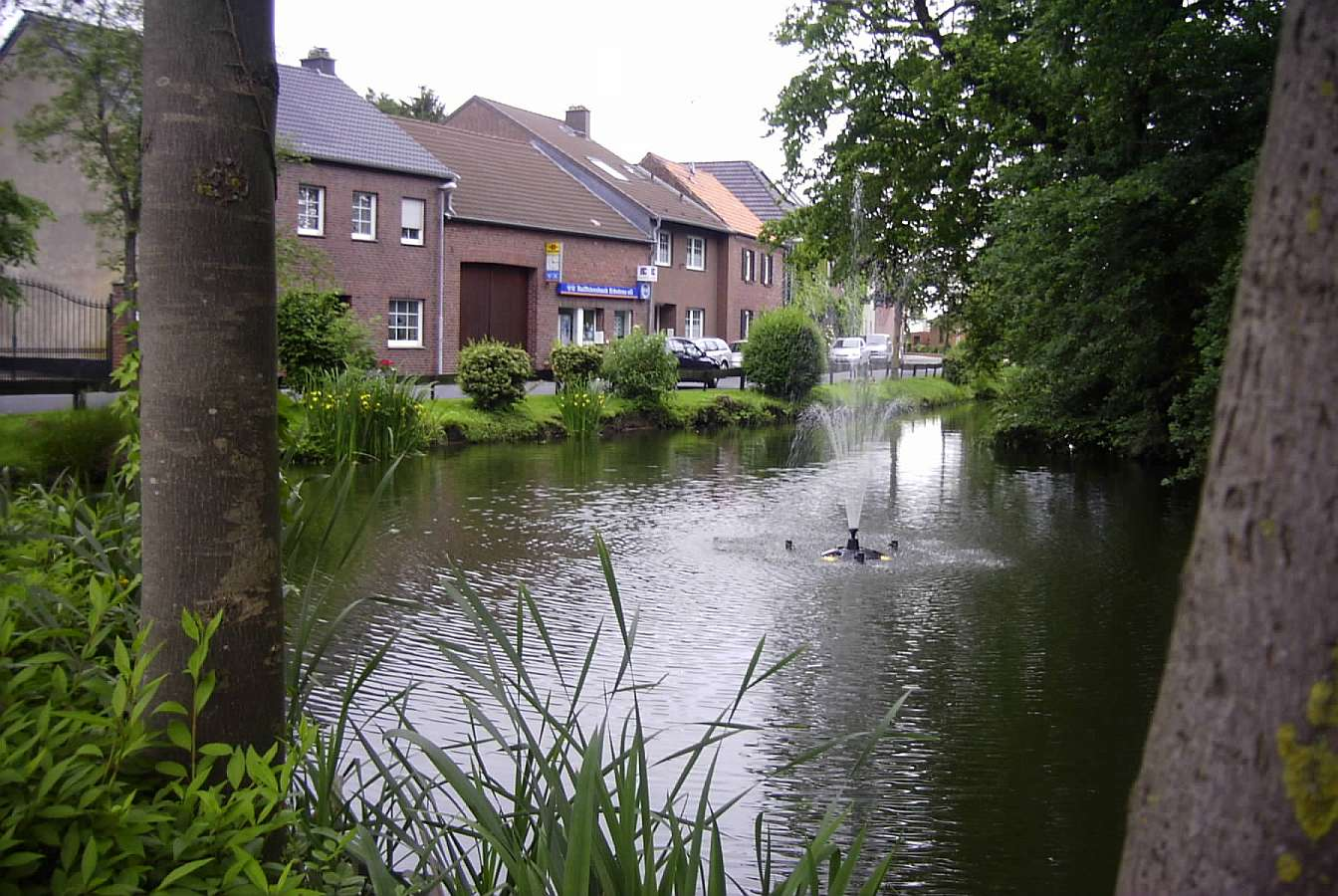 Summary Bildbeschreibung: Hottorfer_Maar Quelle: eigenes Foto... Fotograf/Zeichner: bodoklecksel 15:43, 5. Jun 2006 (CEST) Datum: Juni 2006... Sonstiges: ...